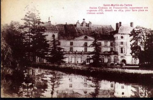 second chateau de franconville avant l'actuel à saint martin du tertre